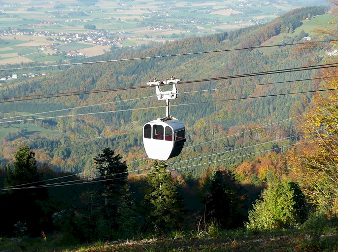 Grünberg Seilbahn, Gmunden